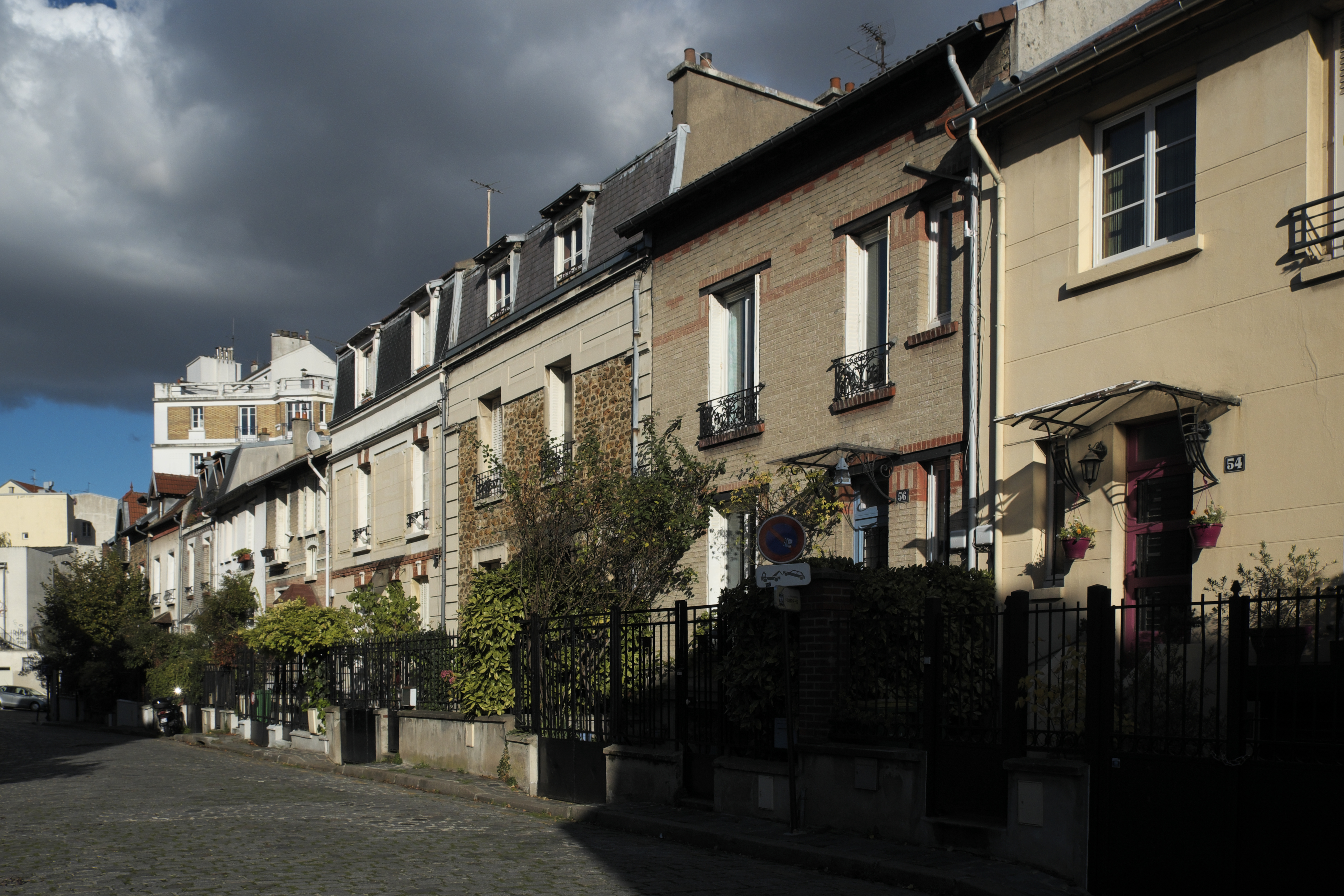 La Campagne à Paris, Rue Irénée-Blanc, im 20. Arrondissement in Paris (Frankreich)